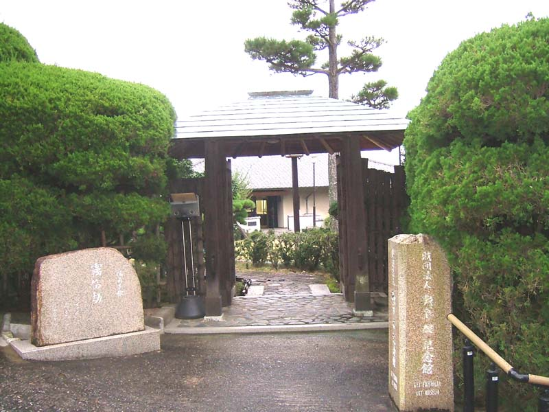 Eingang des Fujiwara-Kei-Museums in Bizen, Präfektur Okayama, Japan